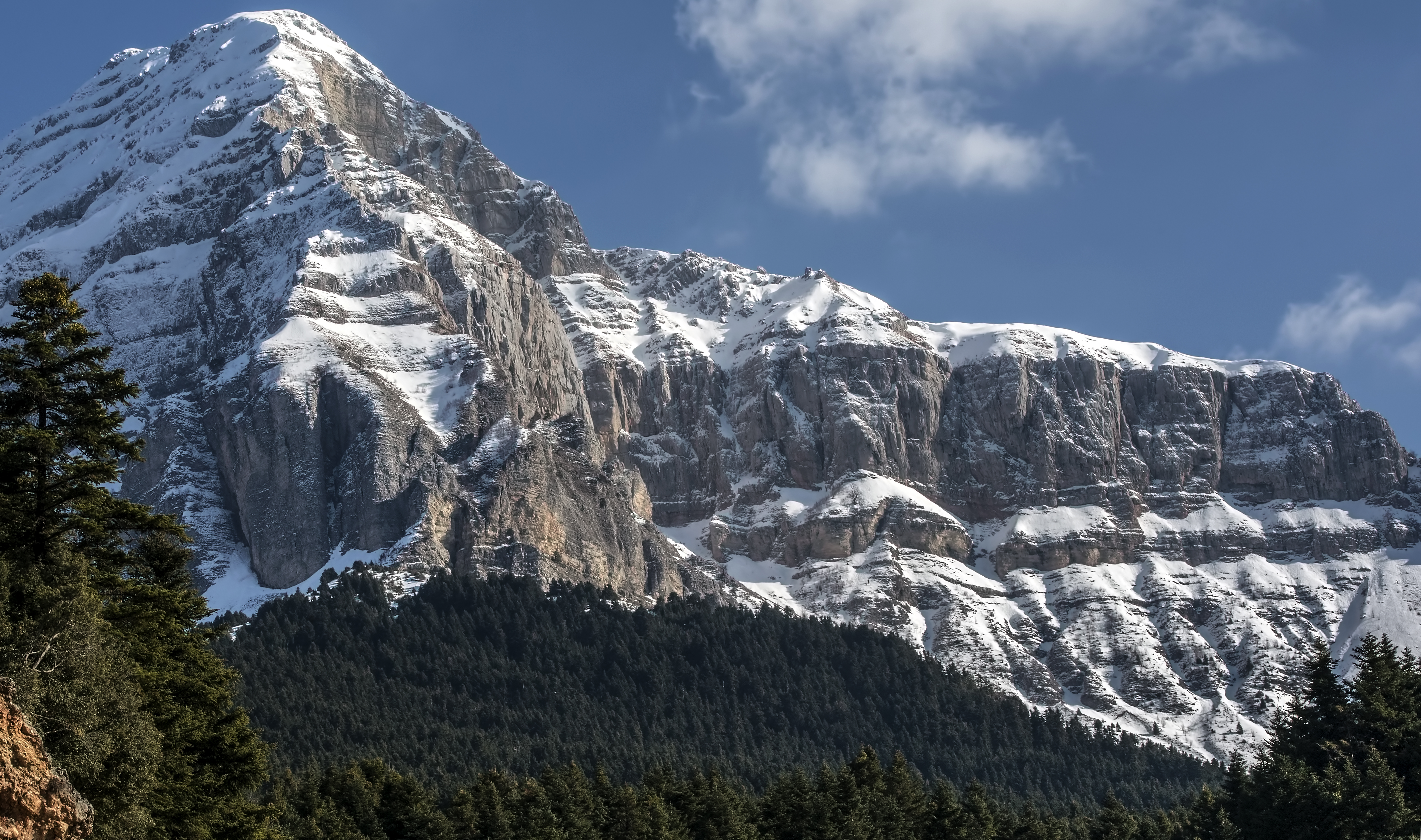 Η επιβλητική Στρογγούλα όπως φαίνεται από τα Άγναντα This is a photography of Natura 2000 protected area with ID GR2110002